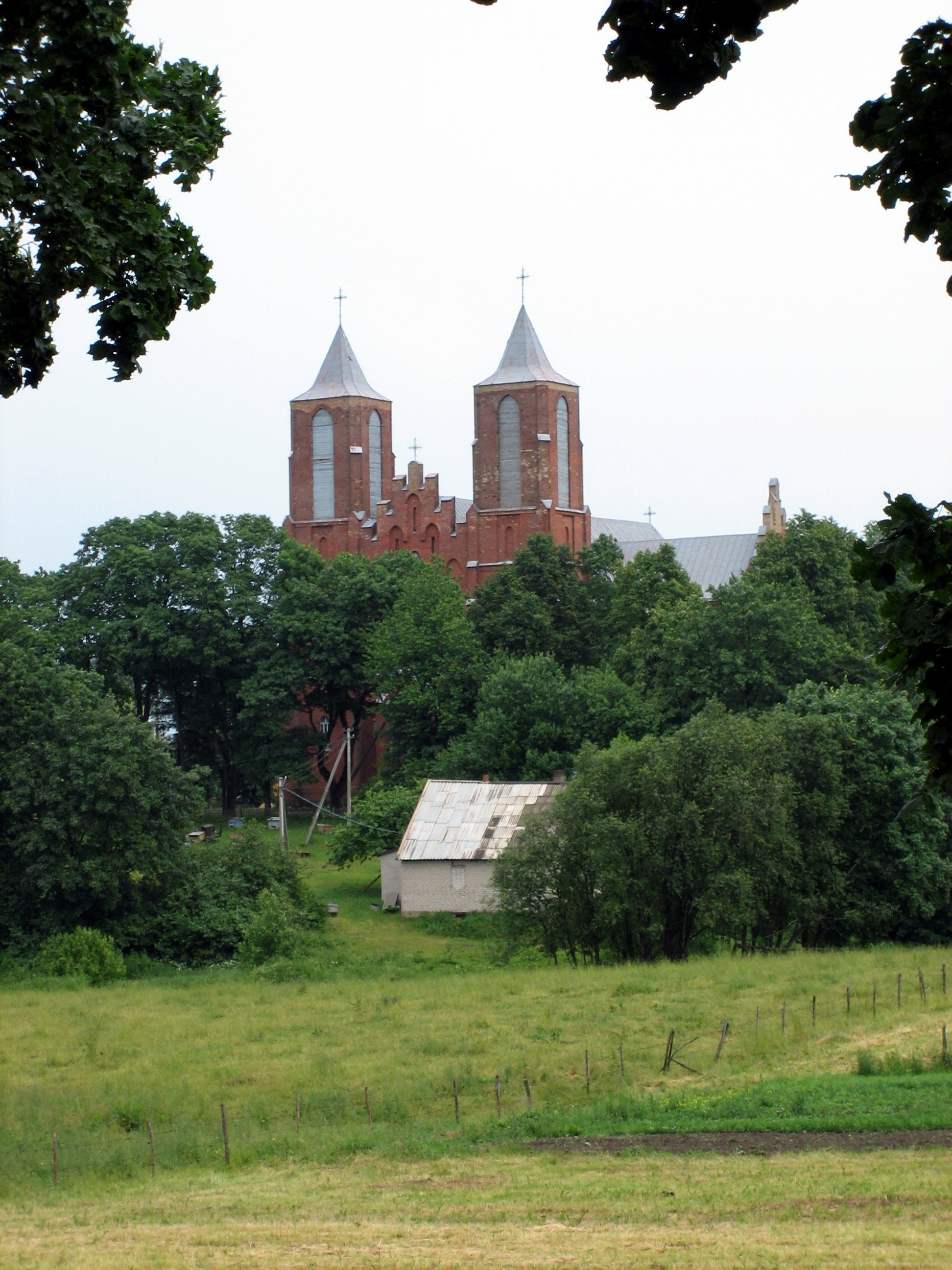 Girdiškės Švč. Mergelės Marijos Snieginės bažnyčia